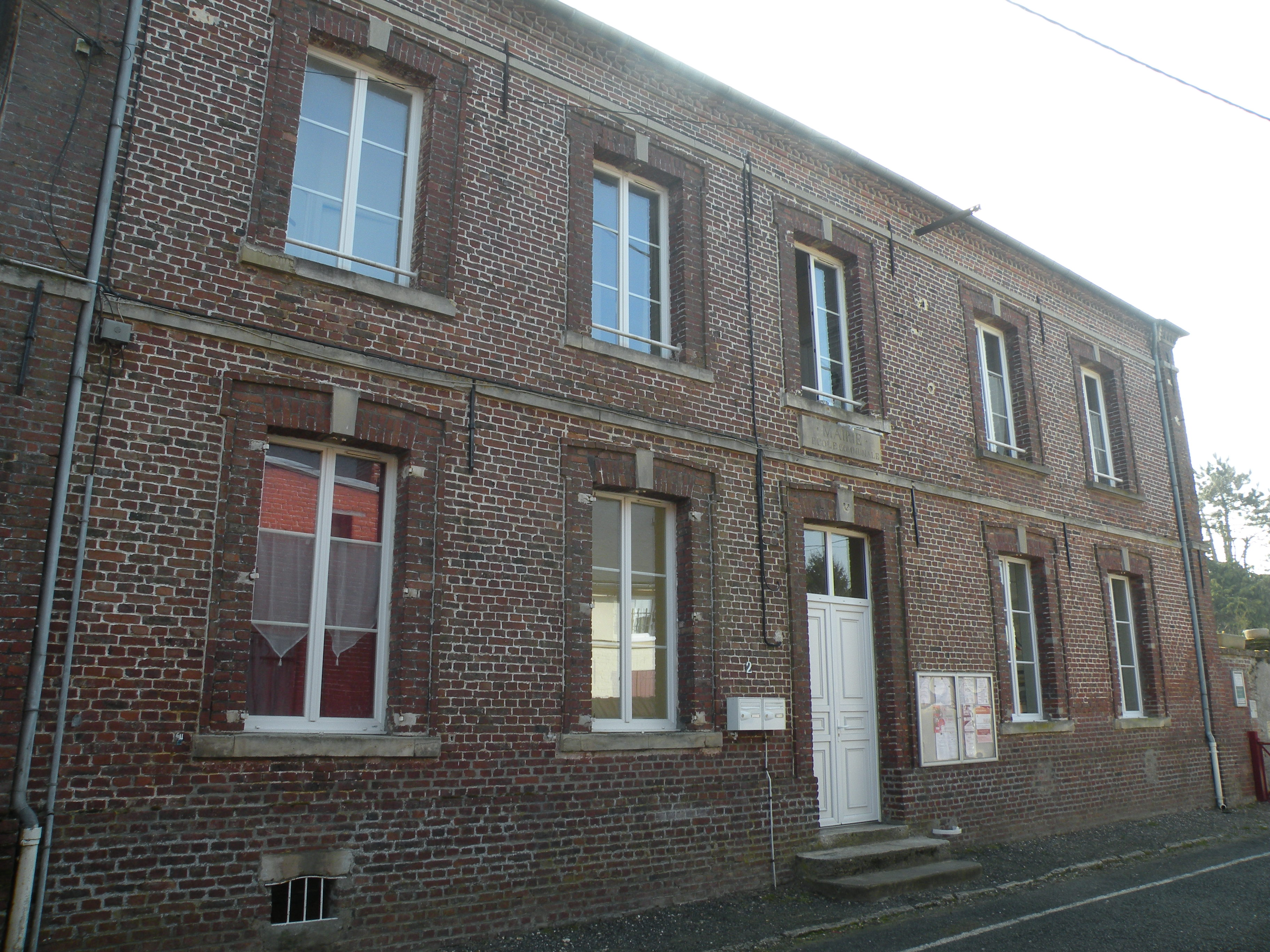 Bachivillers